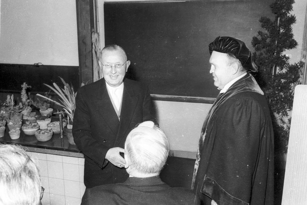 Der Dekan der Mathematisch-Naturwissenschaftlichen Abteilung Prof. Eugen Seibold, (rechts) verleiht dem Leiter des Botanischen Gartens Gartenoberinspektor i.R. Hermann Jacobsen (links) die Ehrendoktorwürde.